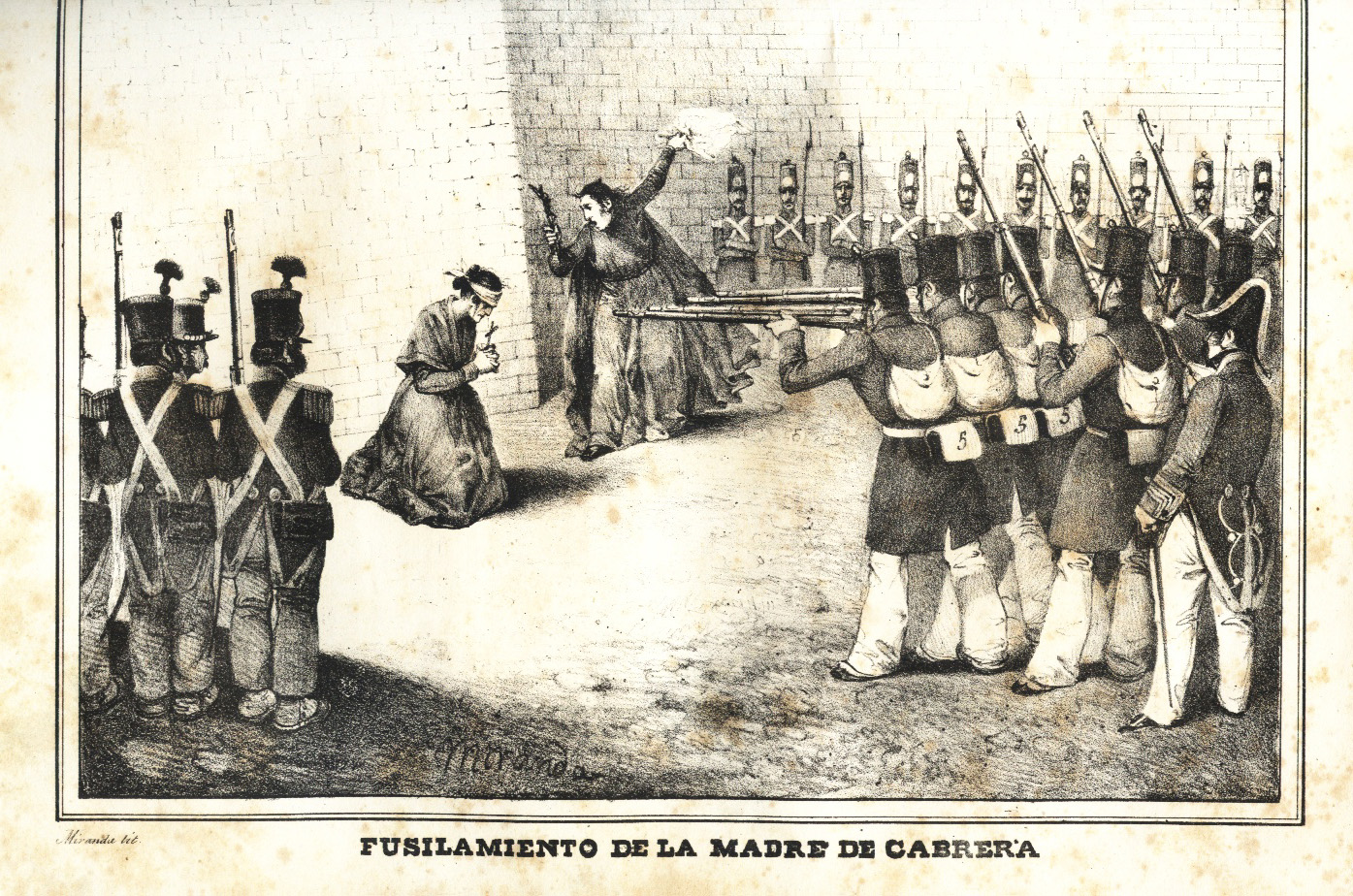 Fusilamiento de la madre de Ramón Cabrera. Dámaso Calbo y Rochina de Castro. "Historia de Cabrera". Madrid 1845